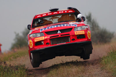 Ралли Мариуполь, этап Чемпионата Украины, трамплин